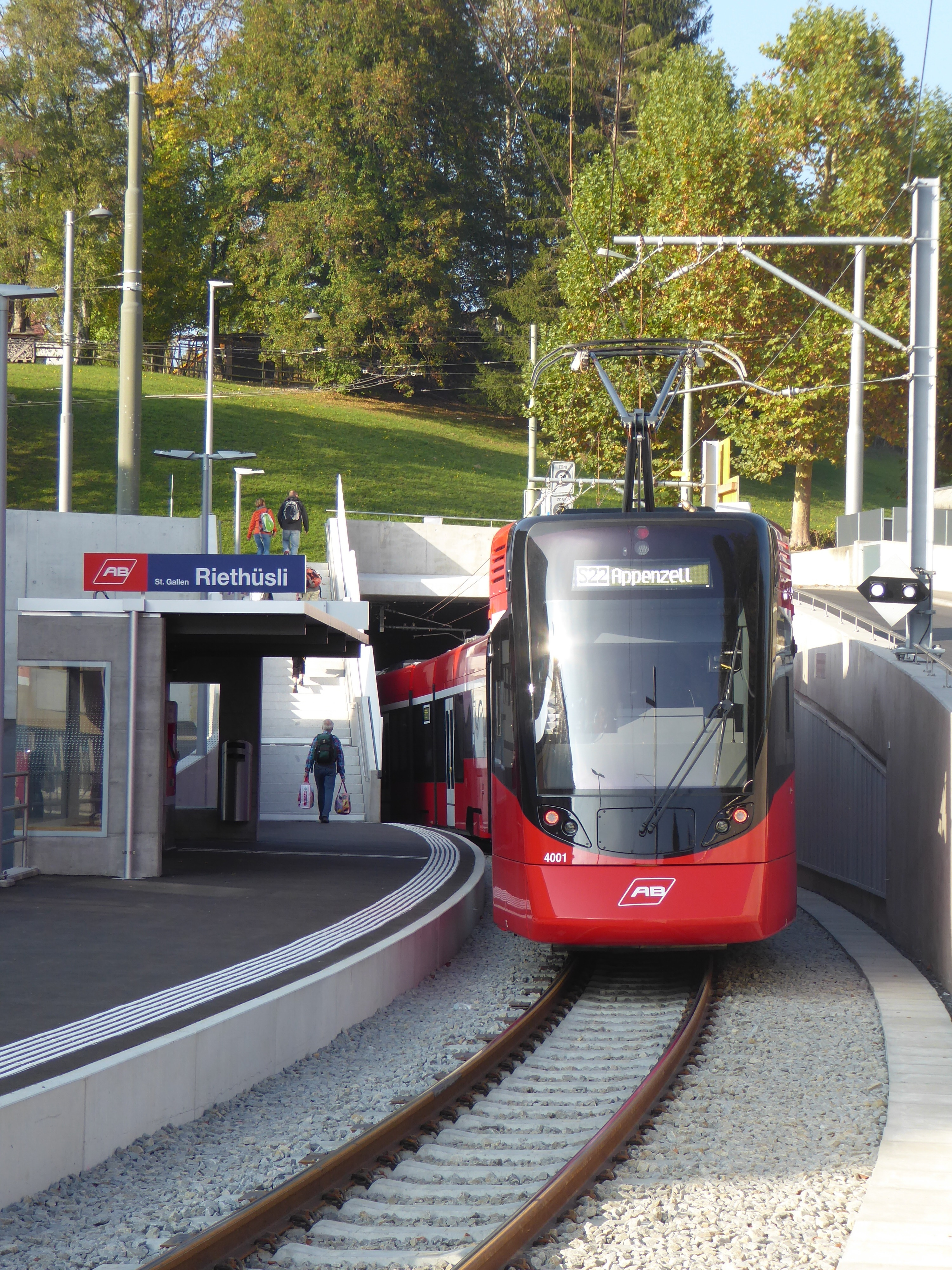 Haltestelle St. Gallen Riethüsli der Appenzellerbahnen (AB) mit einem Triebzug ABe 8/12. Im Hintergrund das Südportal des Ruckhaldetunnels